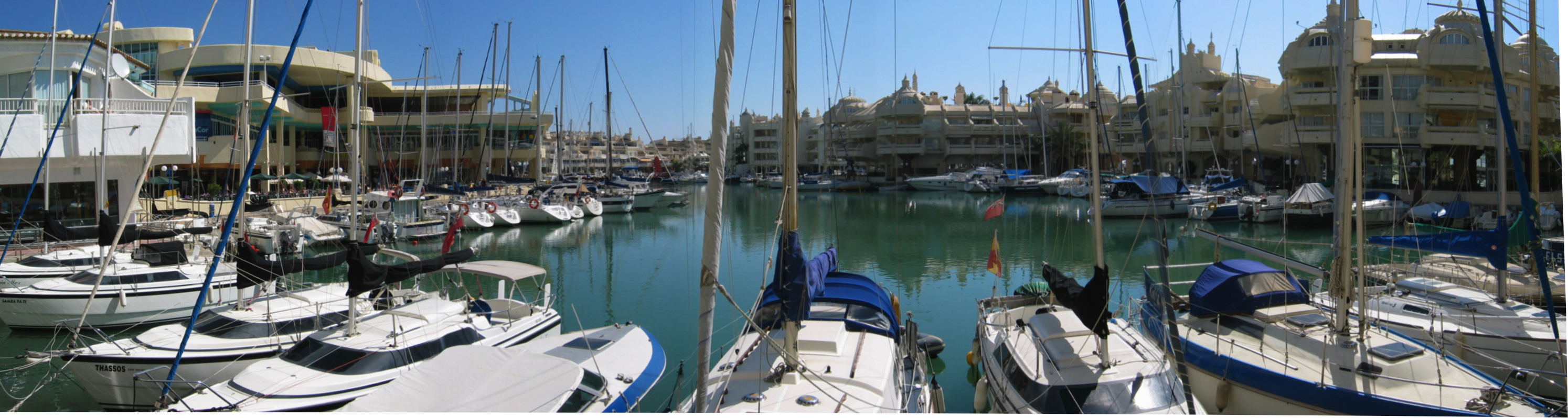 Vista de las islas de levante y de poniente del puerto deportivo de Benalmádena (Málaga, España). Fotografía tomadas por mi.